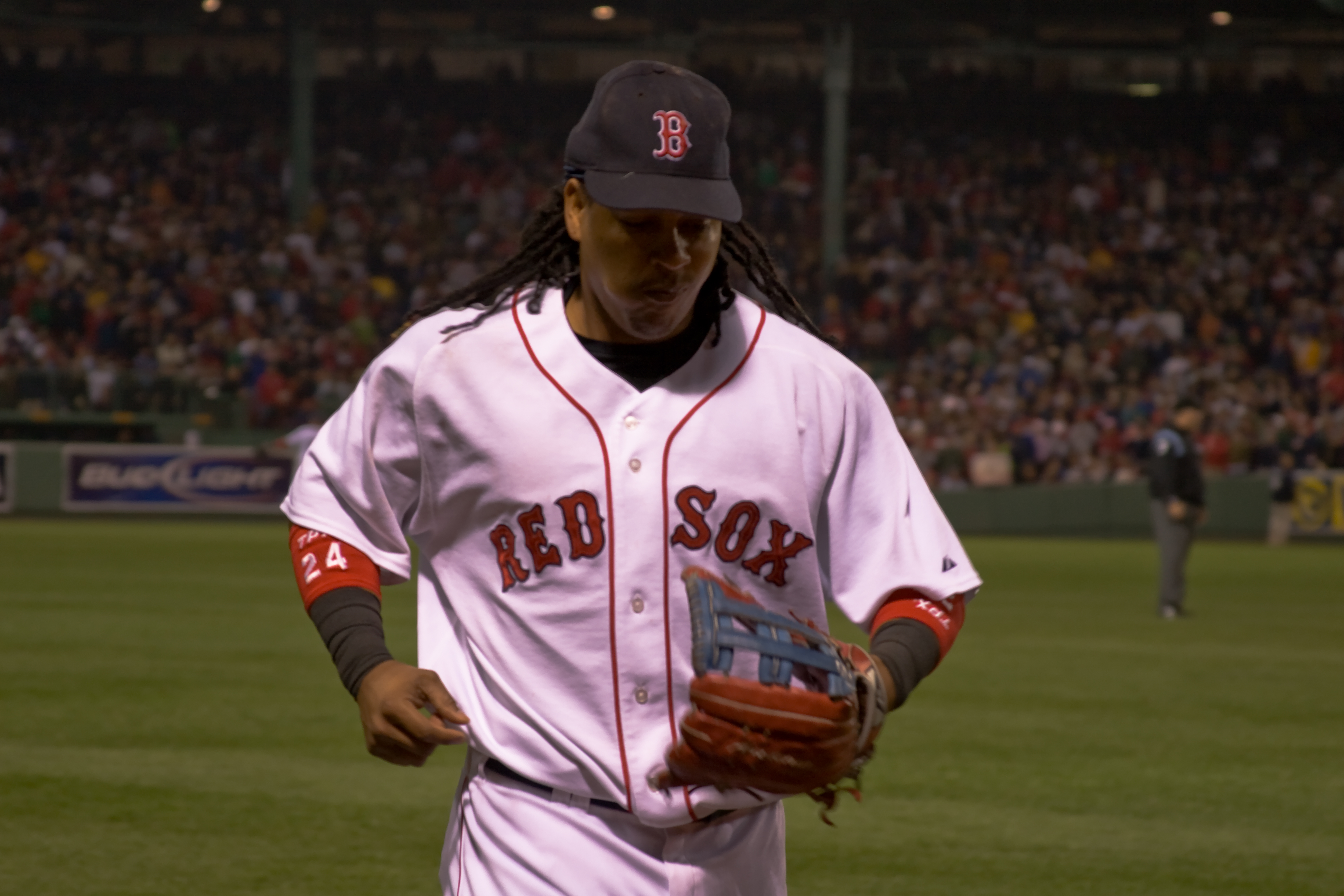 Manny Ramirez